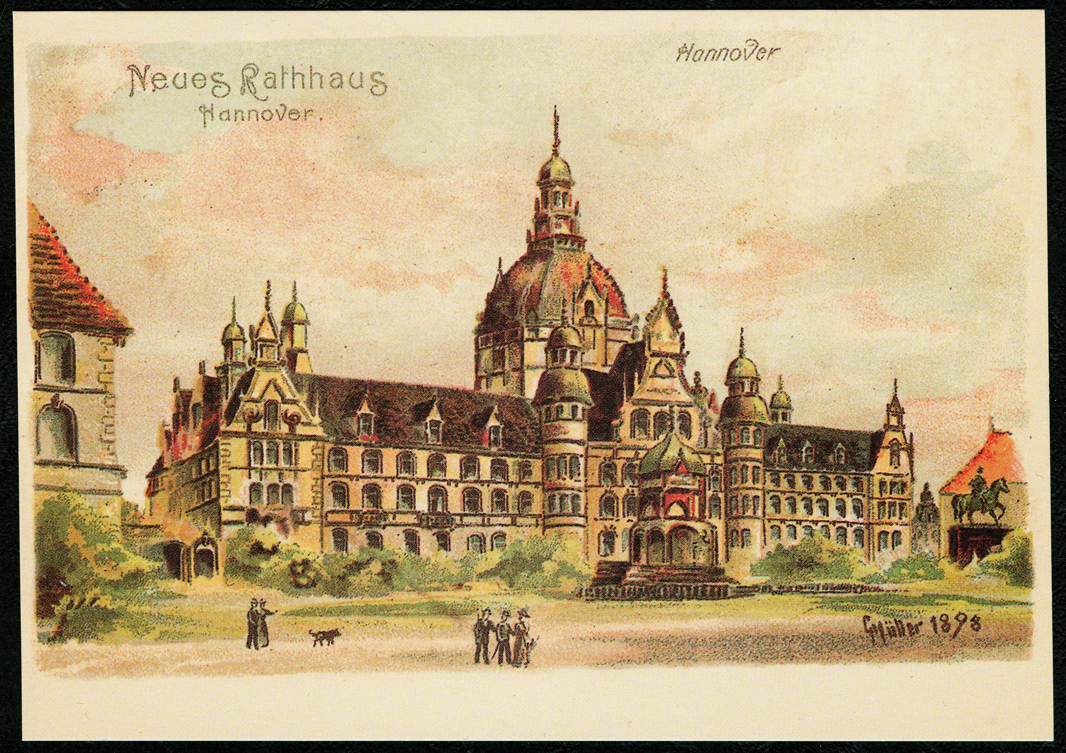 Reproduktion einer farbig lithografierten Ansichtskarte mit der Künstlersignatur von George Müller und der Jahreszahl 1898 aus der "Sammlung Wilkening". Zu sehen ist das - erst später 1913 fertiggestellte - Neue Rathaus von Hannover, hier als Projektion zwischen dem ehemaligen Stadtarchiv (rechts) und dem Kestner-Museum hinter einem so nie platzierten Reiterstandbild ...